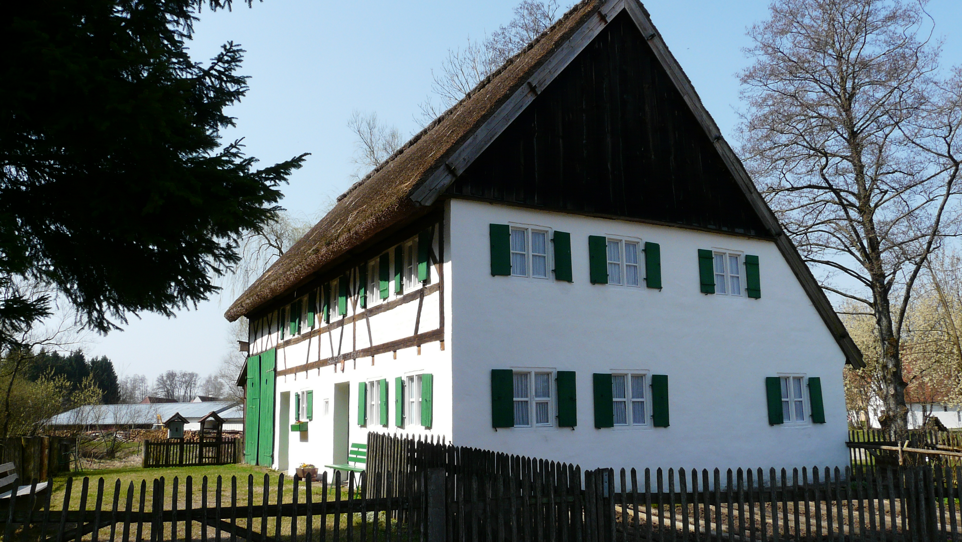 Staudenhaus in Oberschönenfeld, nahe dem Museum Oberschönenfeld, Gessertshausen